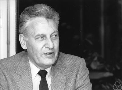 Foto di Karl Peter Grotemeyer